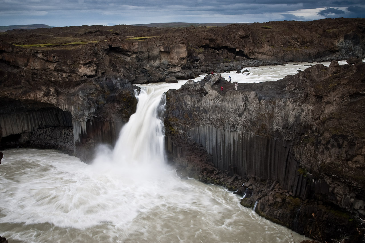 Aldeyjarfoss